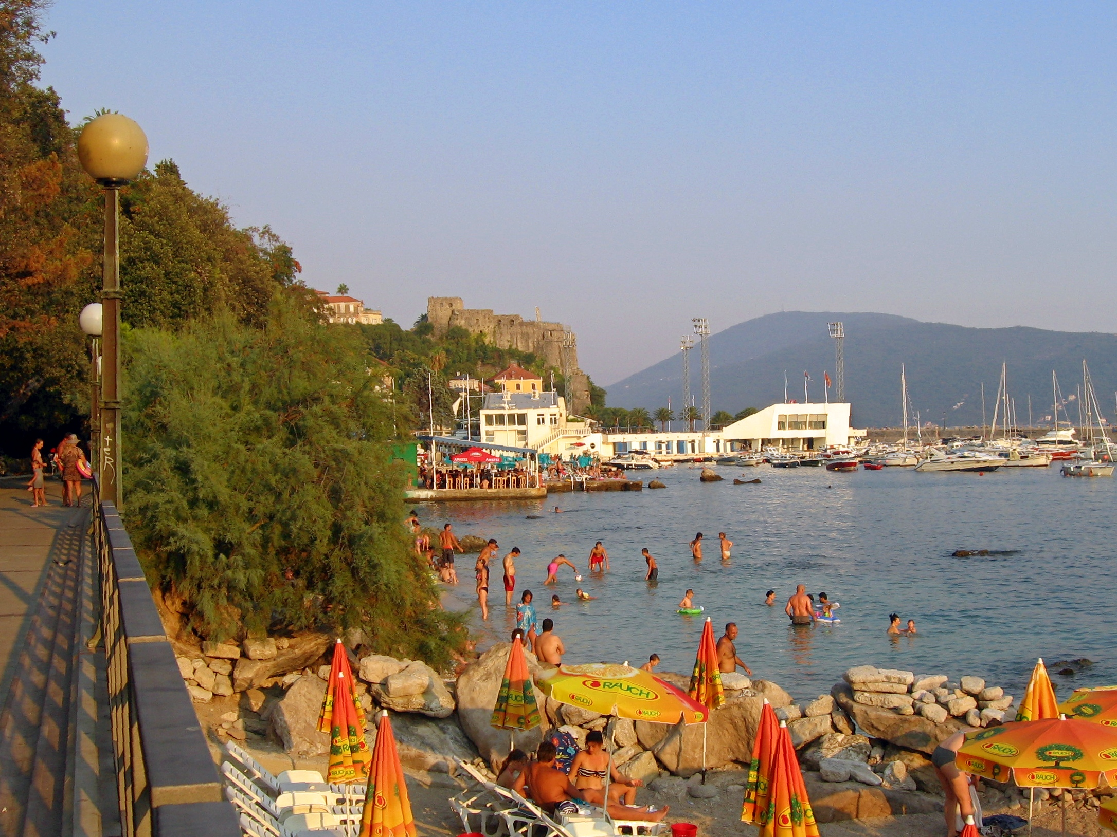 Herceg Novi. Promenade Pet Danica